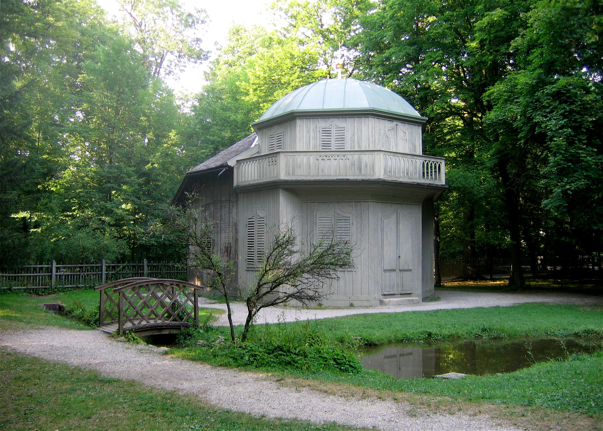 Kronprinzengarten im Schlosspark Nymphenburg, Muenchen